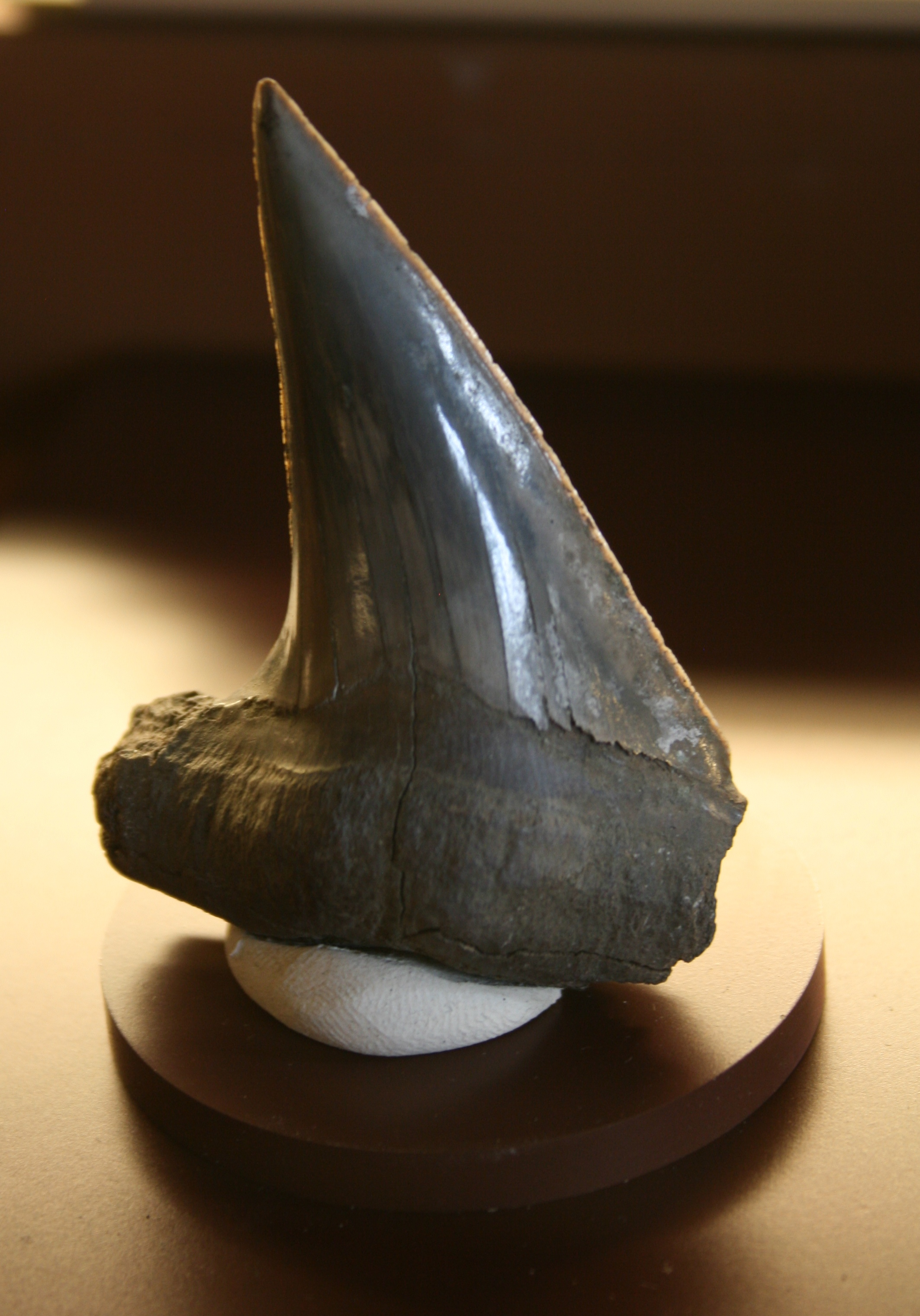 Zahn eines Cretoxyrhina mantelli, aus New Jersey, USA; im Naturhistorischem Museum Wien